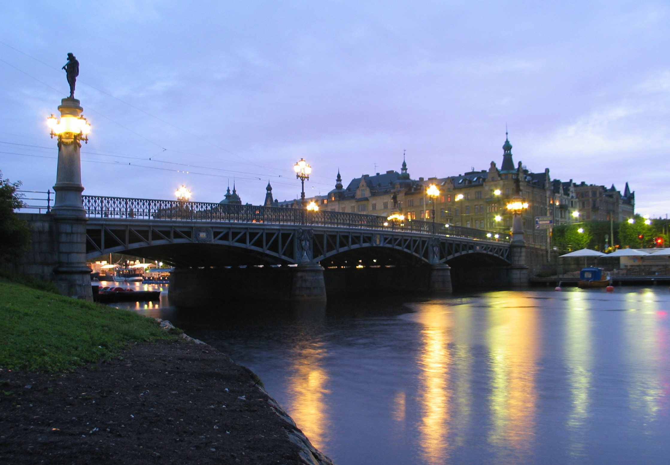 Djurgårdsbron, a bridge in Stockholm, Sweden.